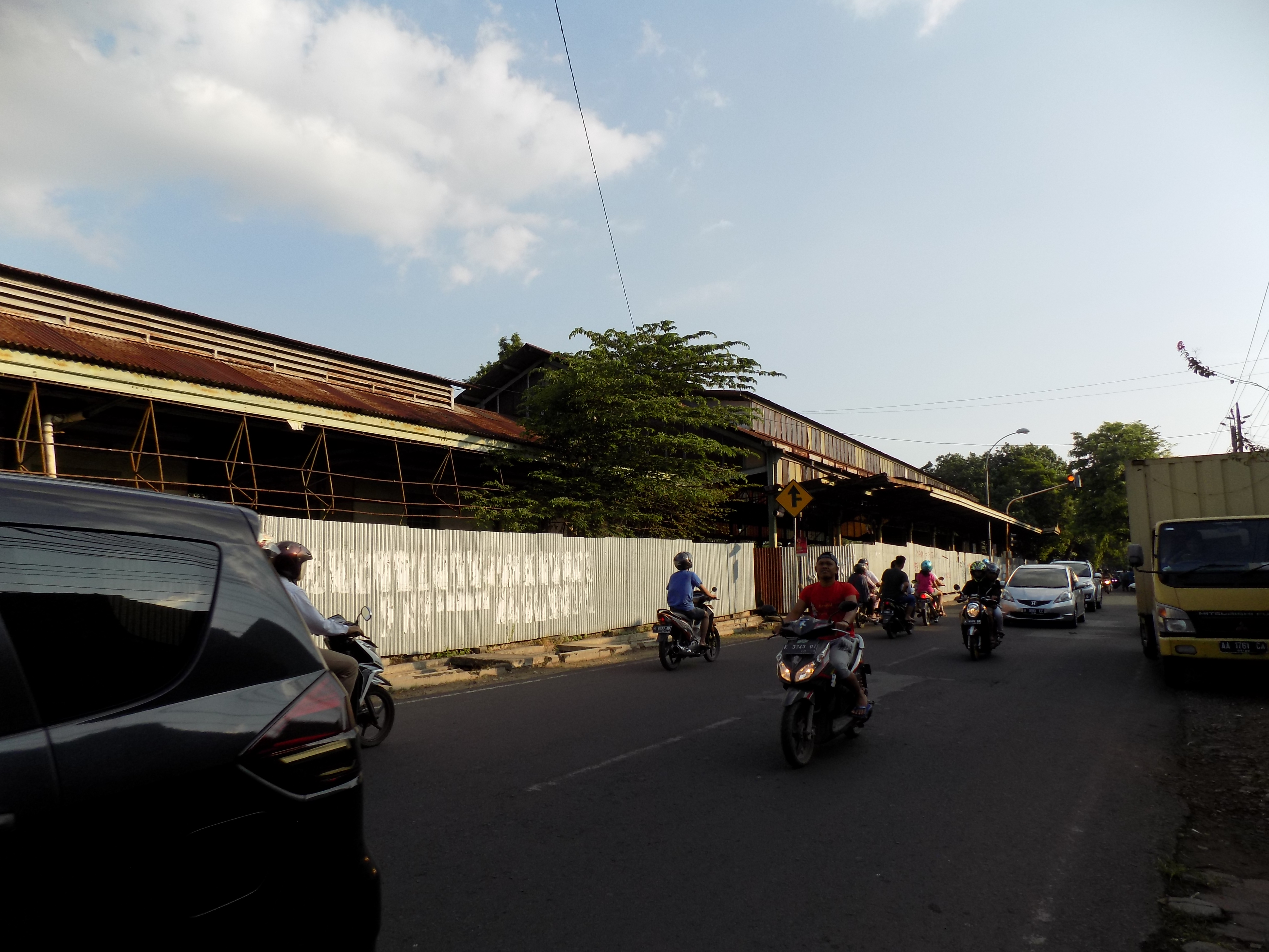 Stasiun Kudus